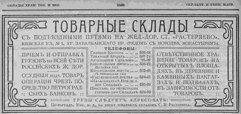 Реклама складов Растеряева в справочнике "Весь Петроград", 1917 год